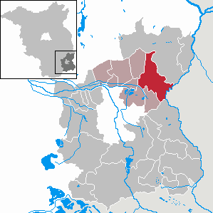 Jänschwalde in Brandenburg (Country) - District Spree-Neiße